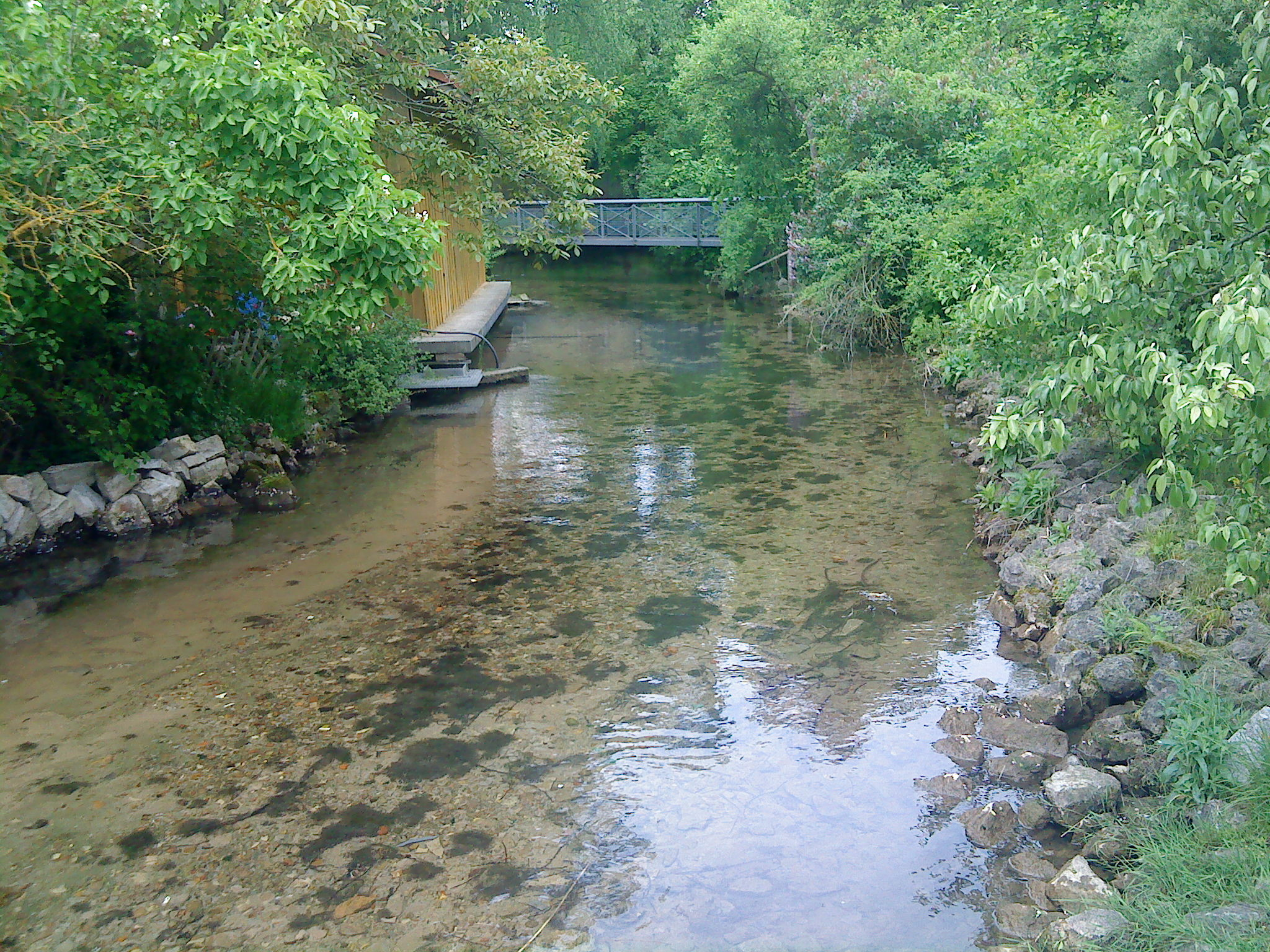 Der abfließende Mühlbach aus der Mühlbachquelle